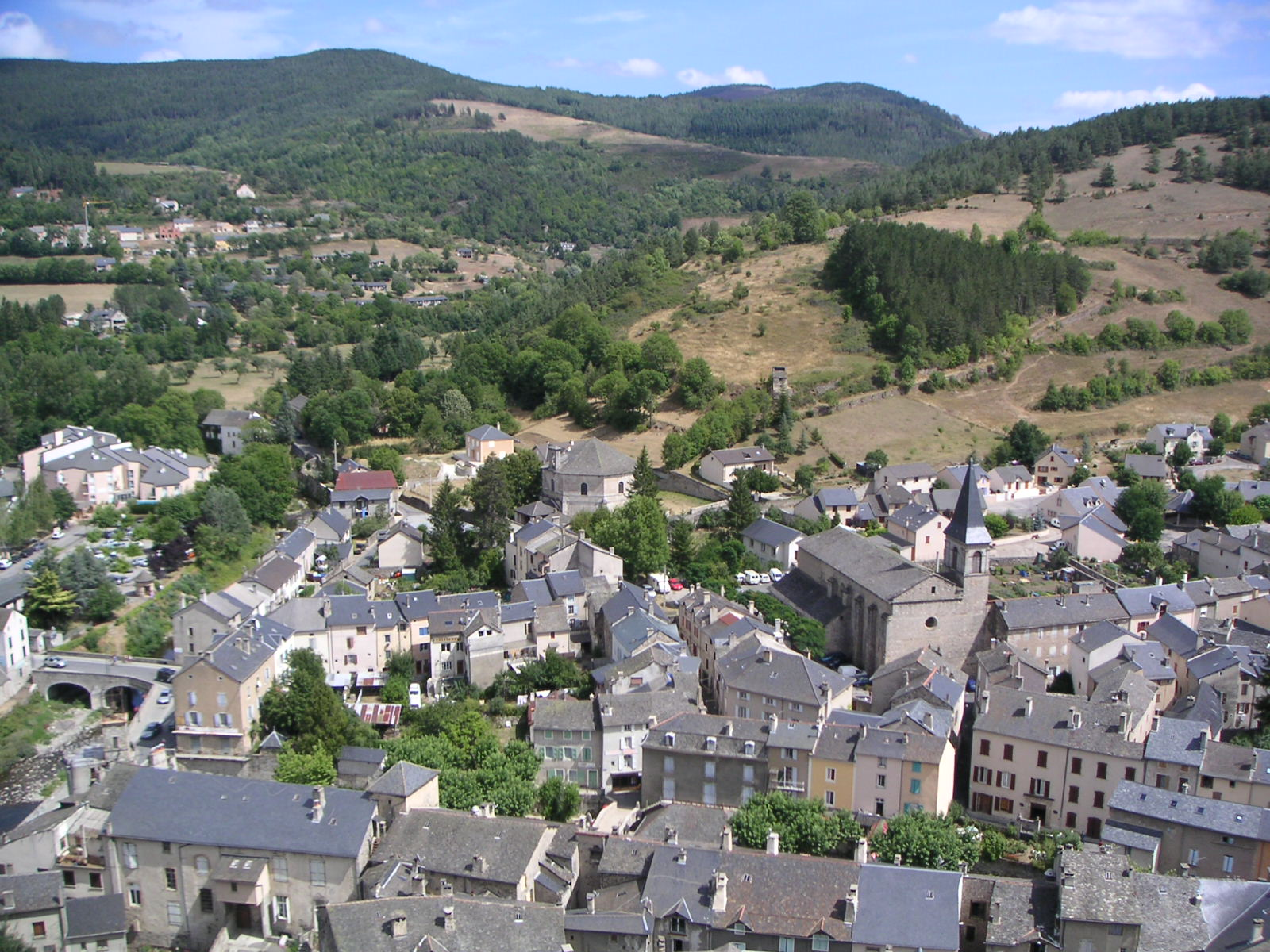 Meyrueis vue de la chapelle Notre-Dame. Photo personnelle - TouN - libre de droit Prise le : 14 août 2005